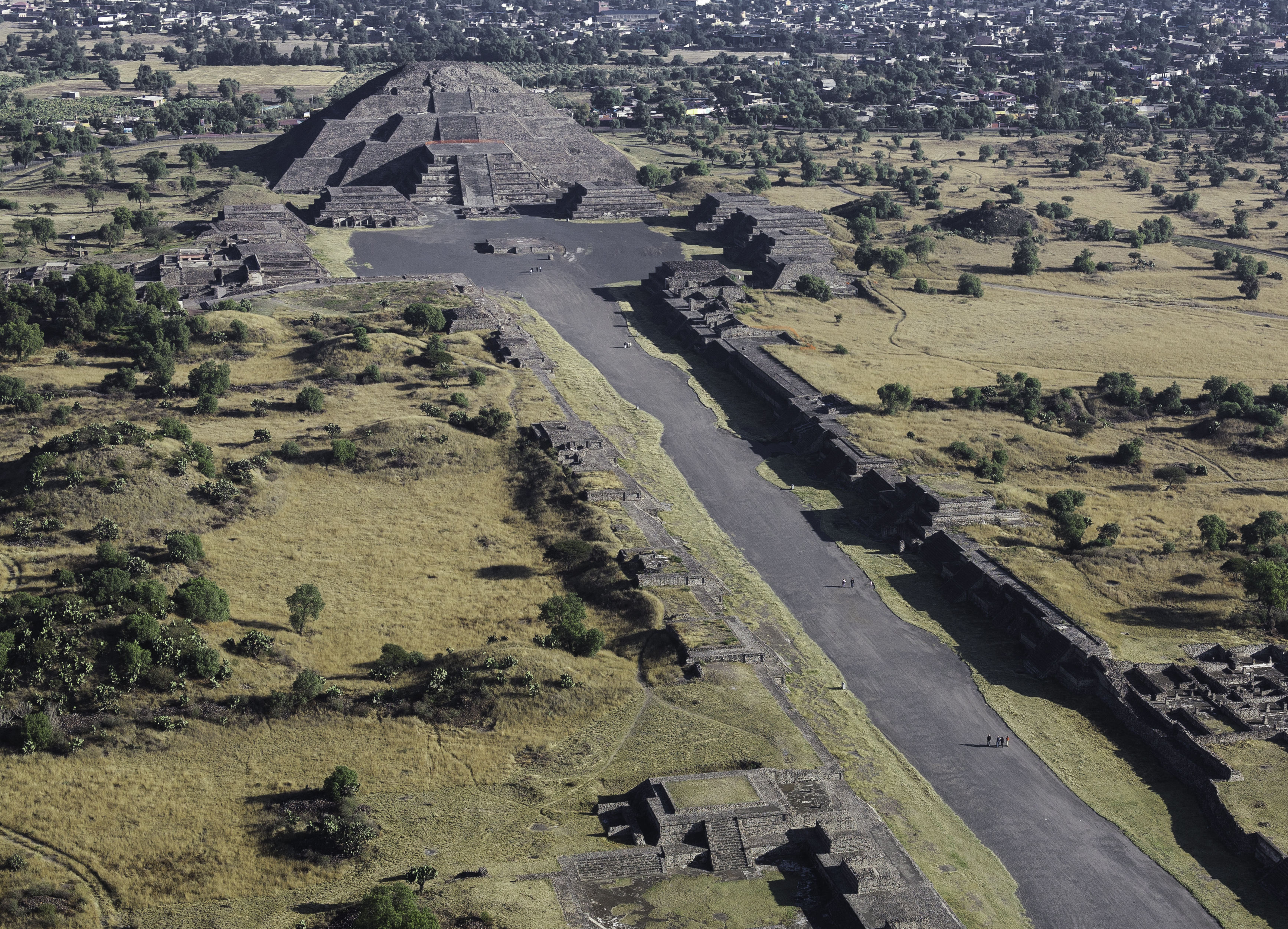 Teotihuacán, Pirámide de la Luna